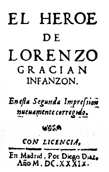 Portada de «El Héroe», de Baltasar Gracián (Madrid, Diego Díaz, 1639)